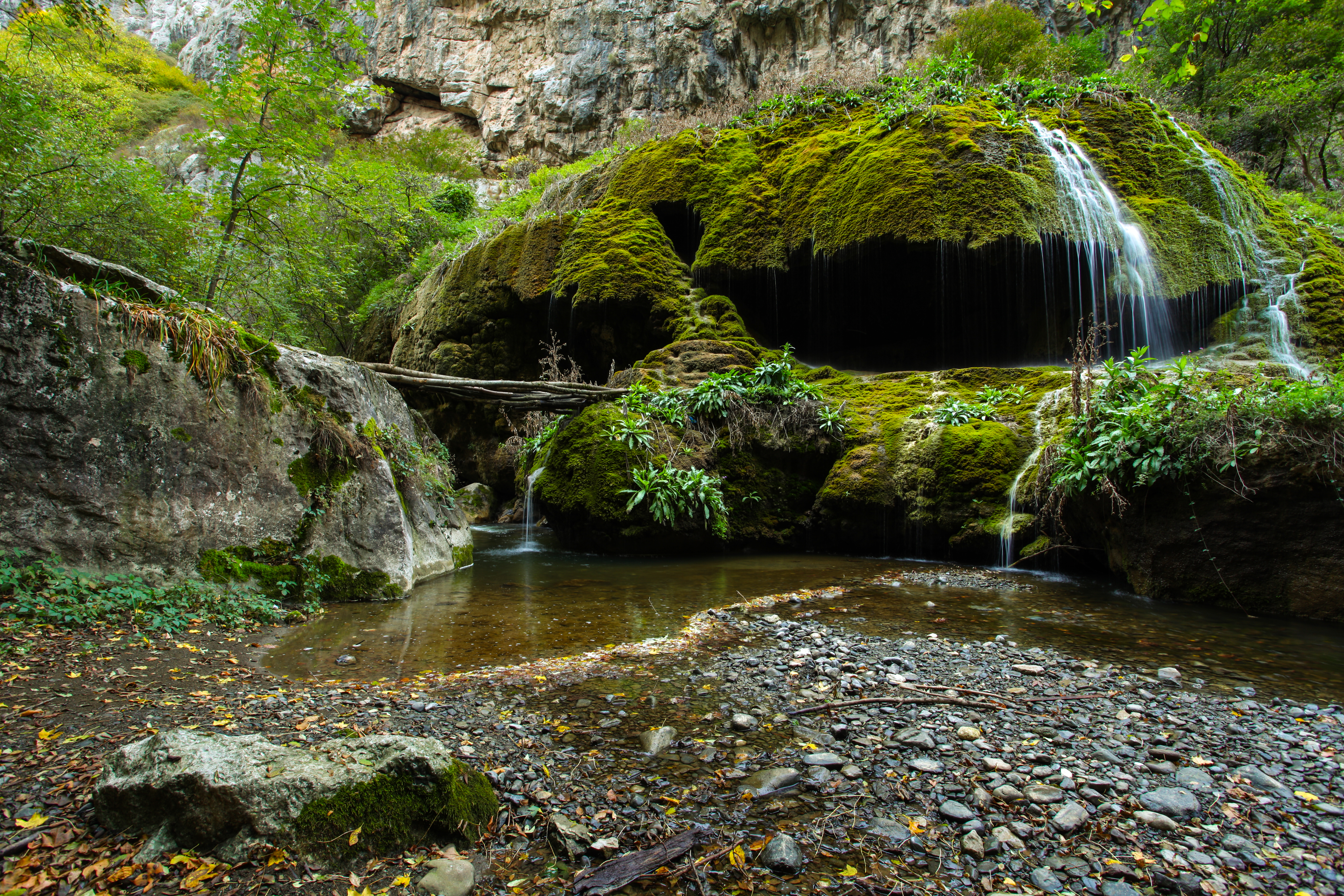 Զոնտիկներ